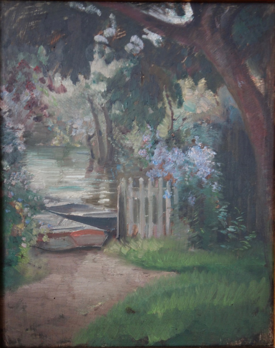 Gemälde Boote am Ufer